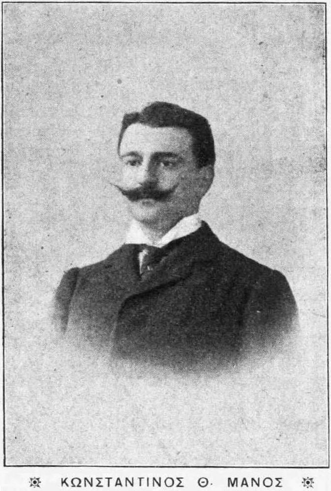 griechischer Politiker und Dichter, 19. und frühes 20. Jahrhundert